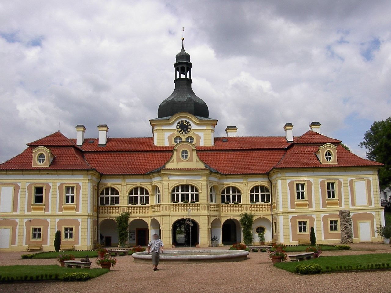 Zámek v Nebílovech (PJ).